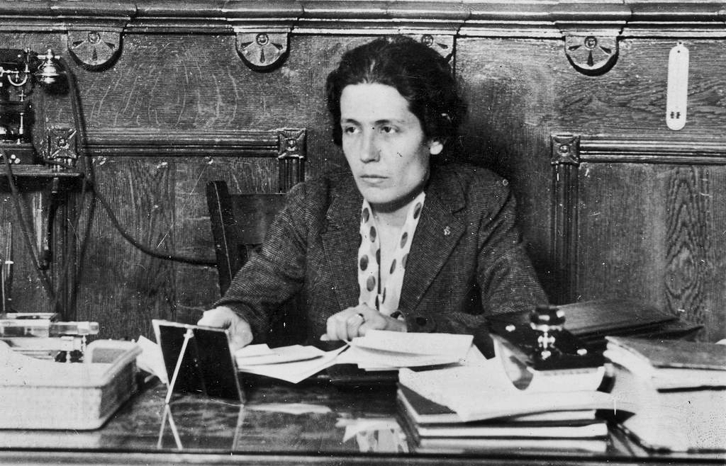 Victoria Kent hacia 1931, en su época como Directora General de Prisiones.